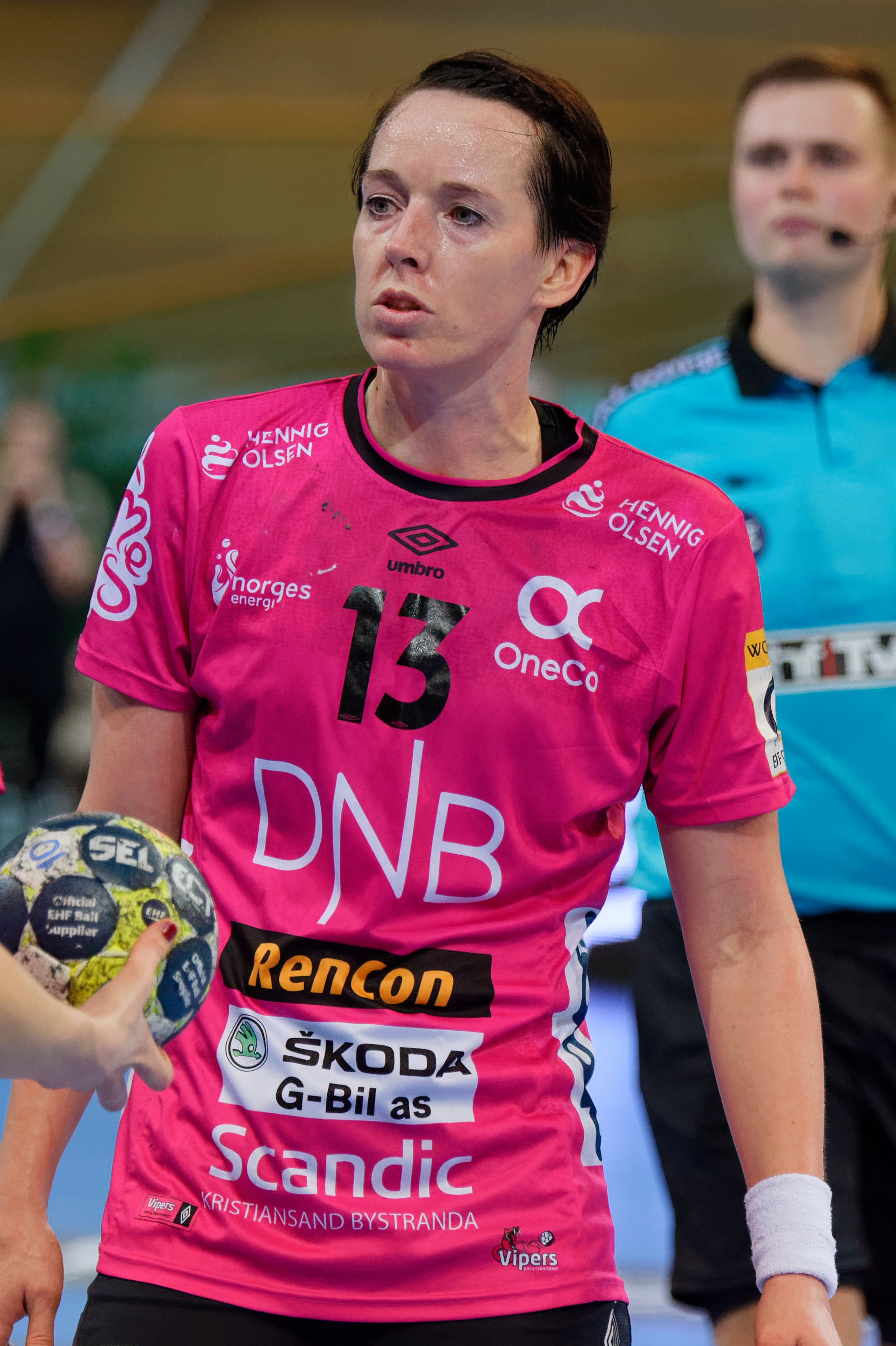 Rencontre du tour principal de coupe EHF entre Issy Paris Hand et les norvégiennes de Vipers Kristiansand au vélodrome de Saint-Quentin en Yvelines, le 03 février 2018.